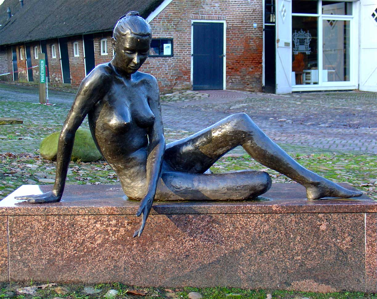 Nienke door Charles Henri in Echten (gemeente De Wolden)